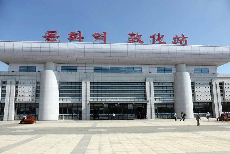 敦化駅正面